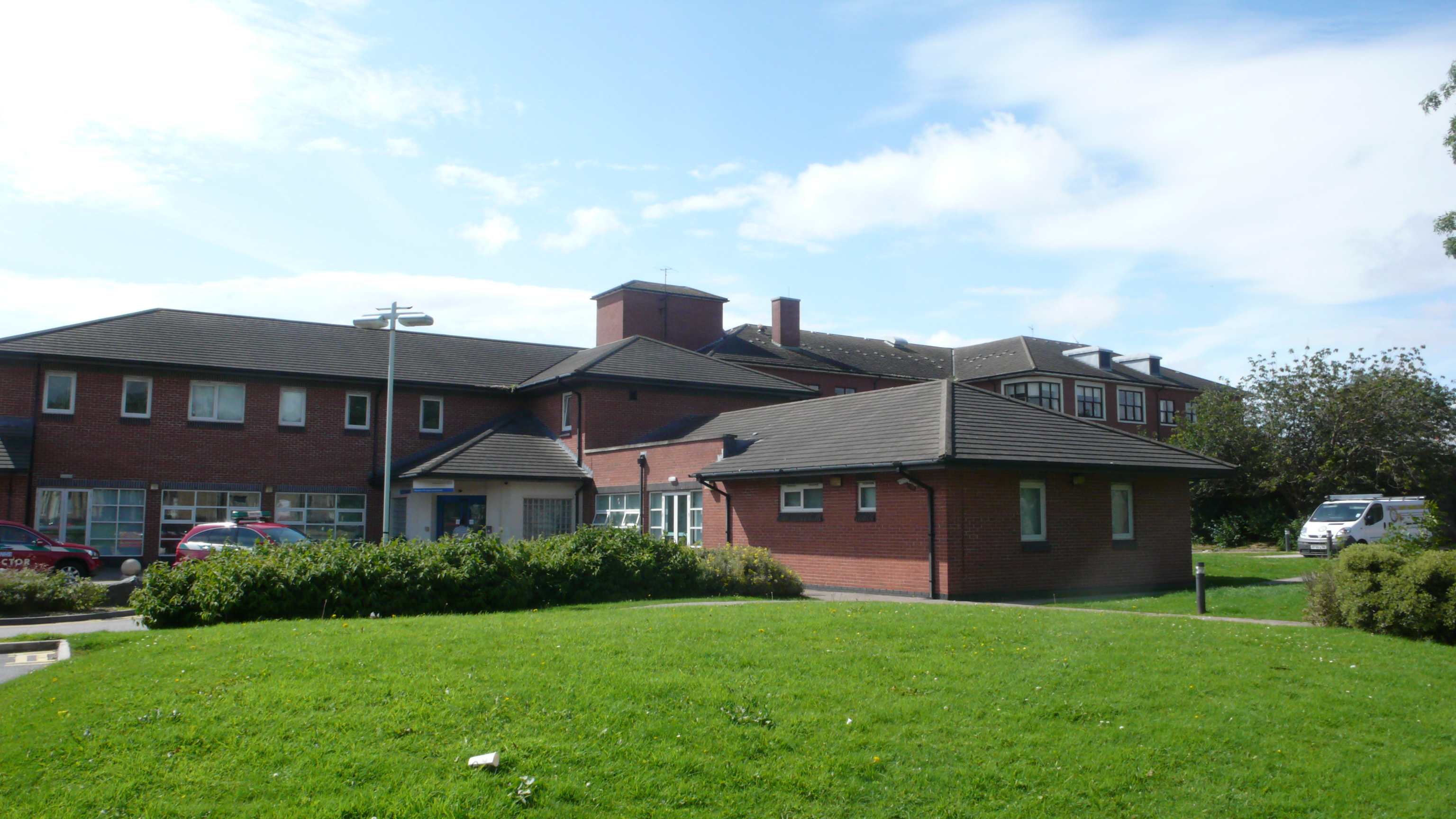 Queen Victoria Hospital